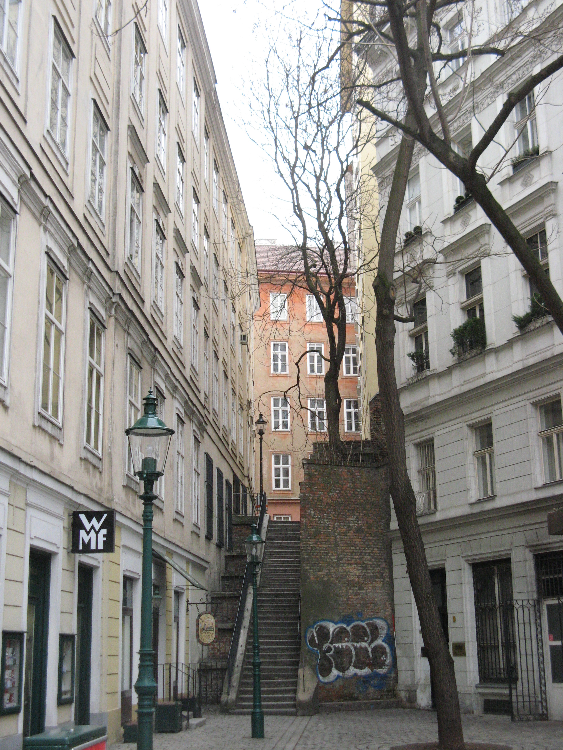 Mölker Steig, Wien-Innere Stadt